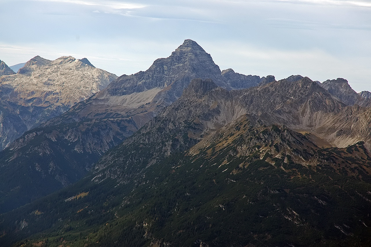 Der Hochvogel in den Allgäuer Alpen von der Knittelkarspitze